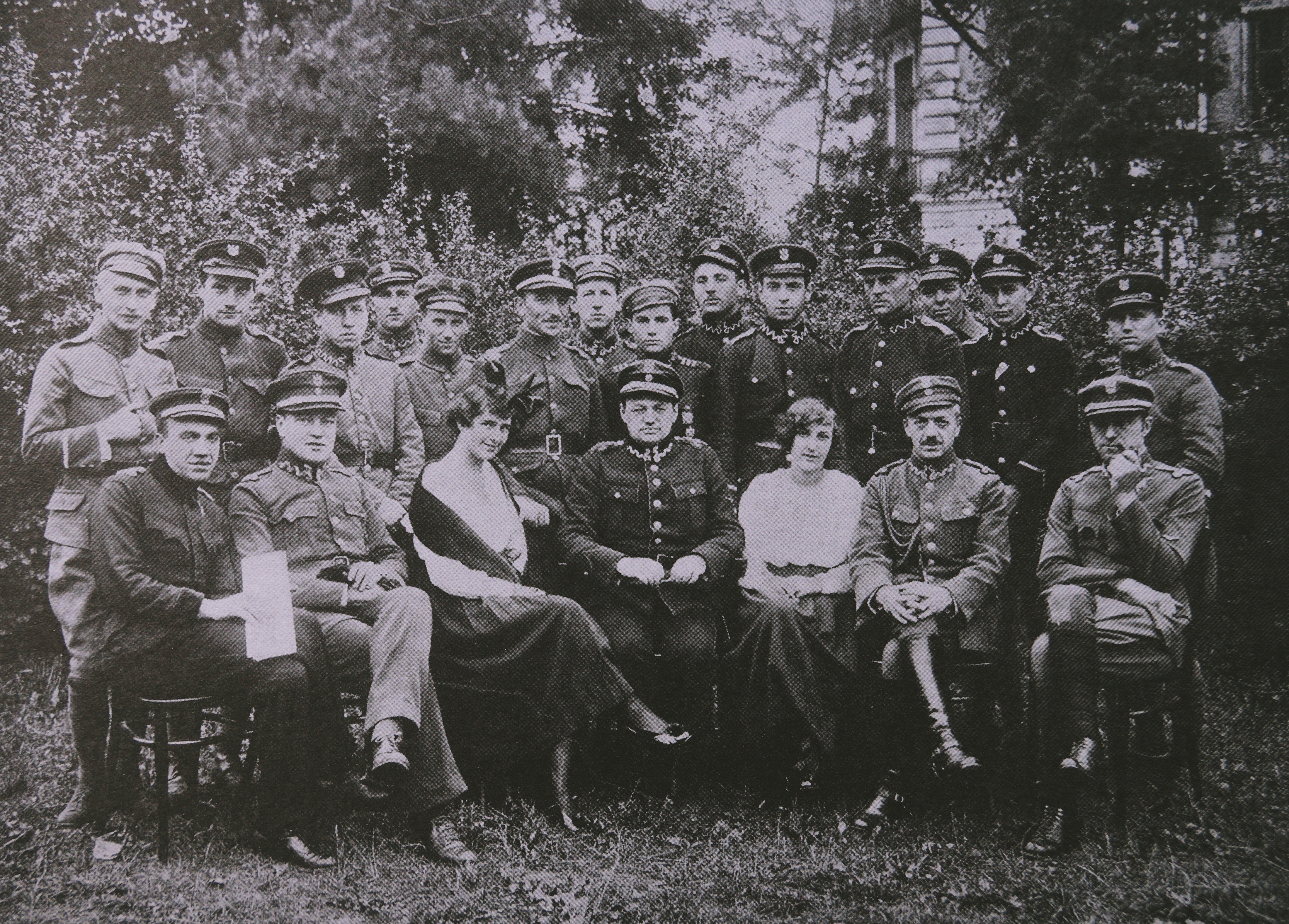 Inspektorat Wojsk Lotniczych w maju 1919 r. Oficerowie: por. August Menczak, kpt. Janusz de Beaurain, ppłk. Hipolit Łossowski, ppor. Dziedzicki, por. Wiktor Willman, ppor. Król.